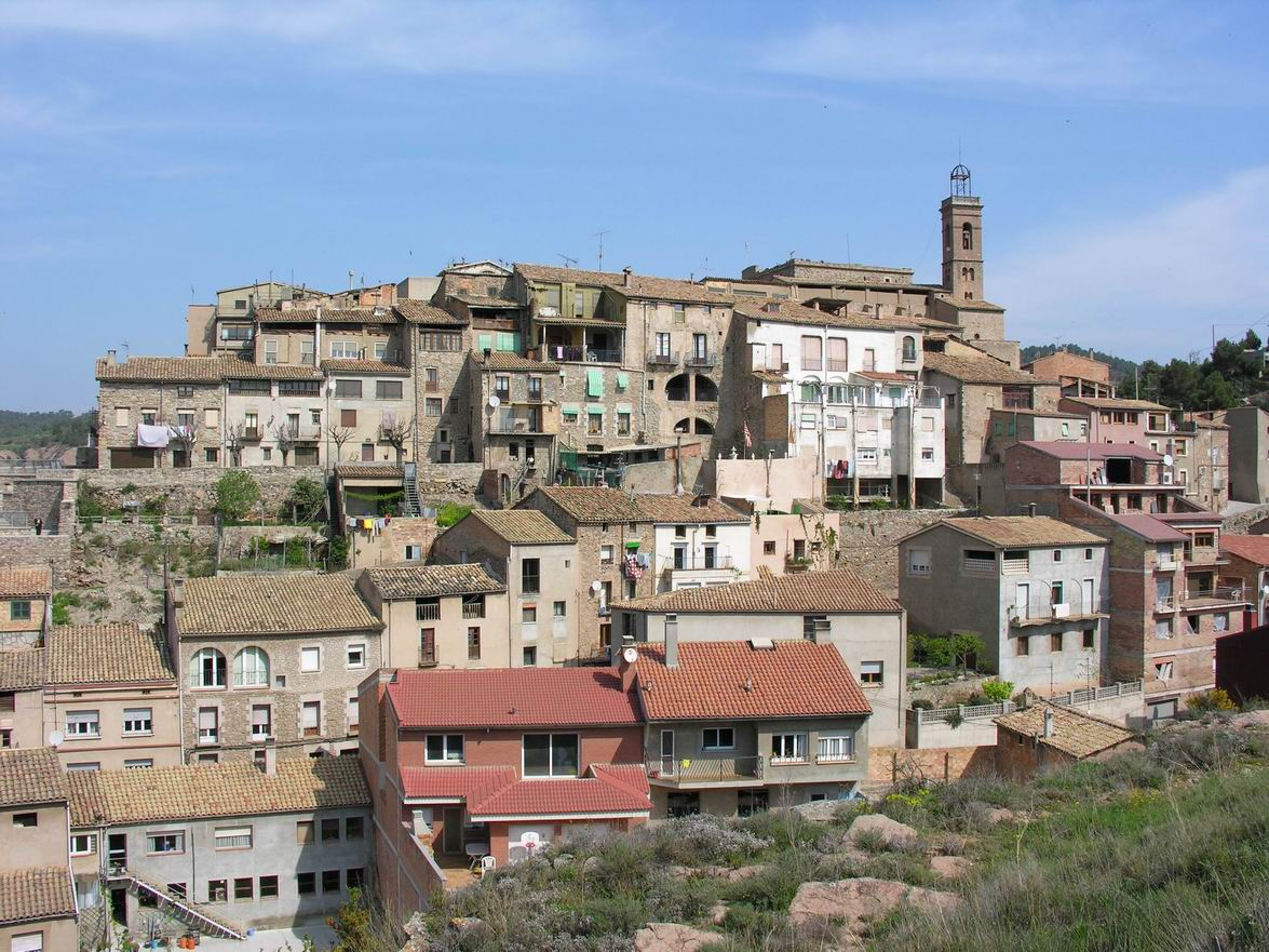 Imatge de Súria, el Bages, Catalunya.